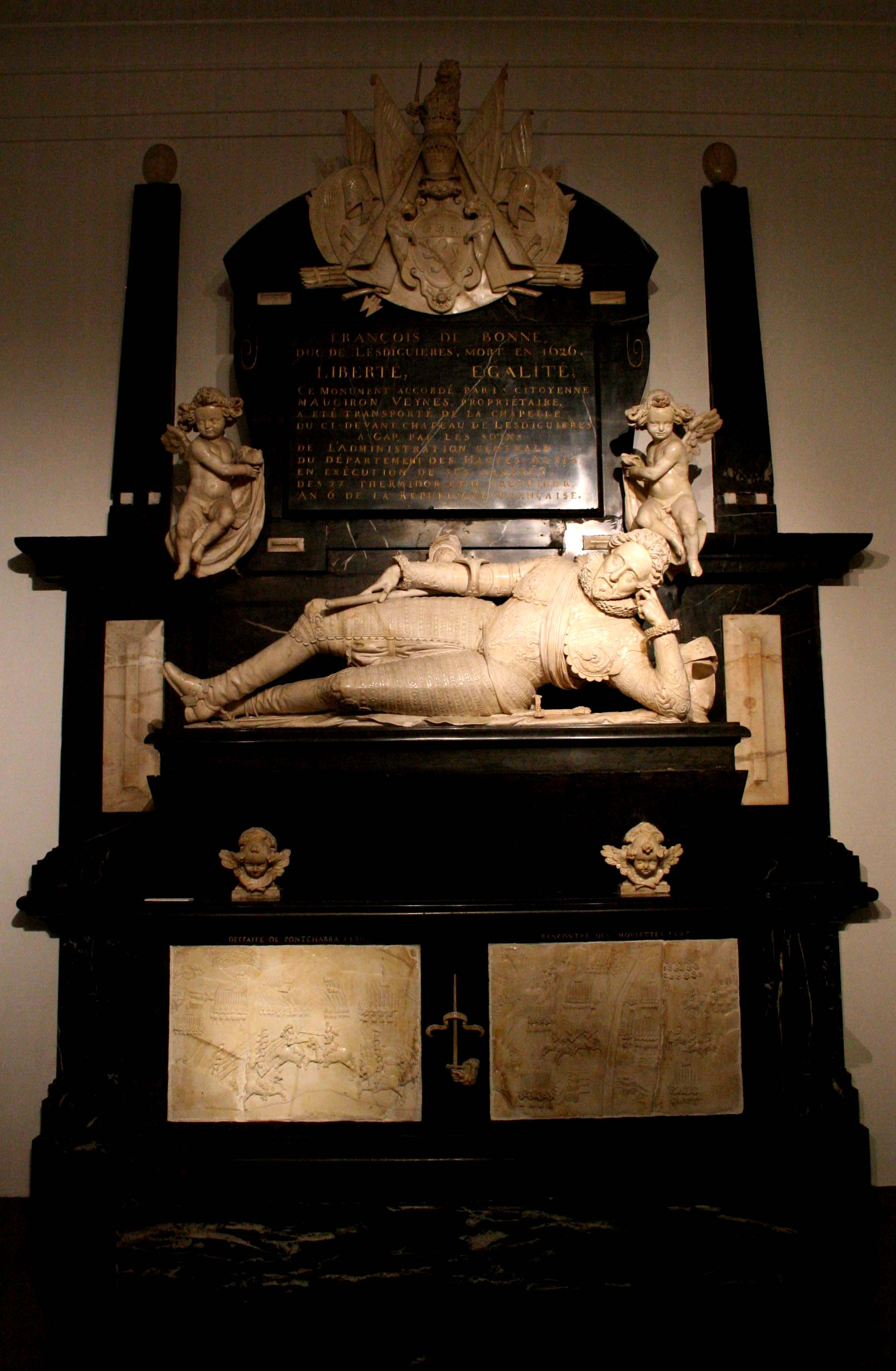 Mausolée de Lesdiguières, dernier connétable de France, exposé au Musée Muséum départemental des Hautes-Alpes à Gap.